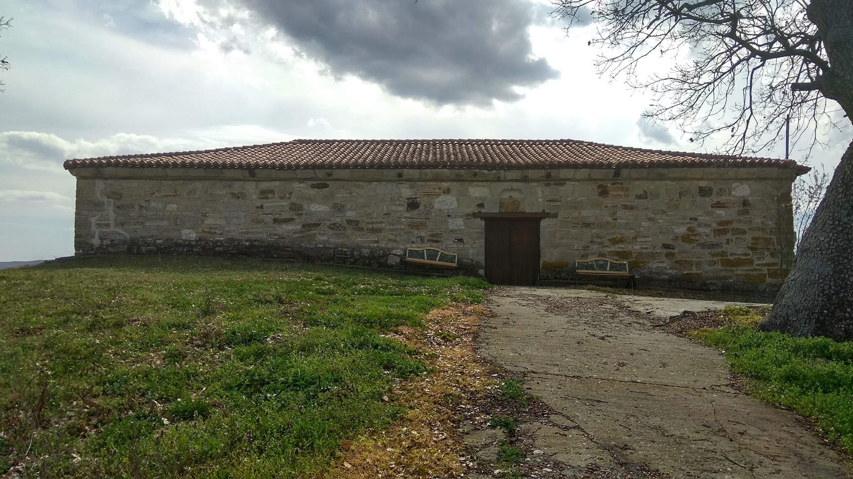 Εικόνα του ναού